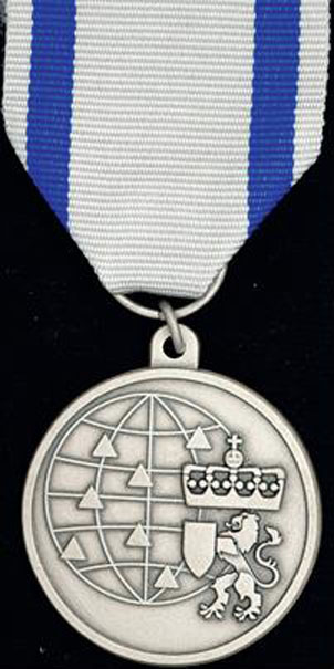 Норвежская медаль Гражданской обороны "За международную службу"